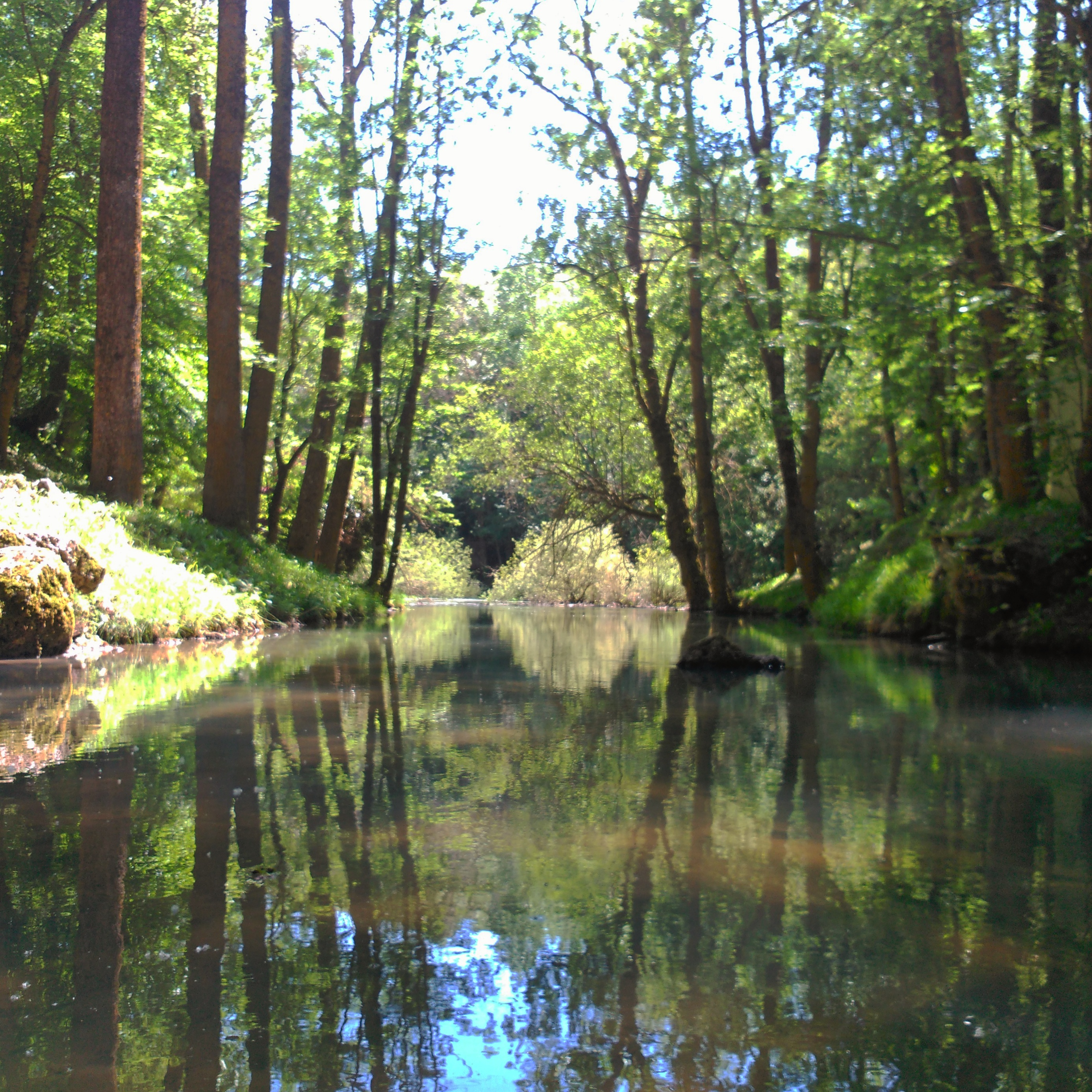 En la imagen podemos ver las aguas del río Ebro inmediatamente después de haber resurgido del subsuelo, esto es porque el agua que vemos en la imagen es en realidad agua del río Híjar la cual se filtro en el subsuelo y posteriormente resurgió, dando lugar al nacimiento tradicional del río Ebro. Foto tomada el 7-6-15 por Pablo Ardura.